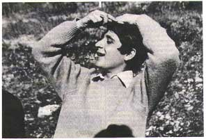 In campagna.